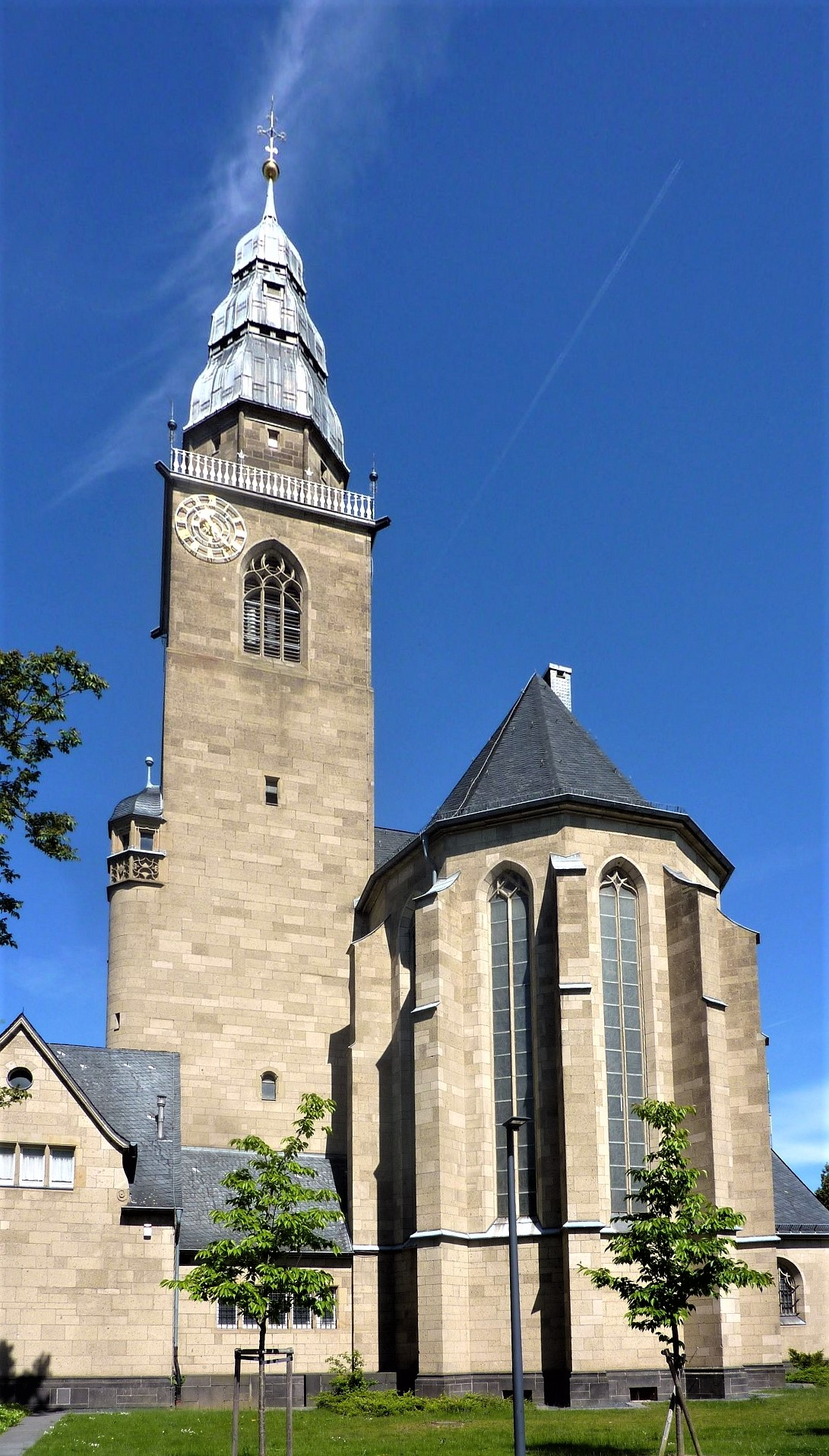 Heilige Dreikönige (Neuss)